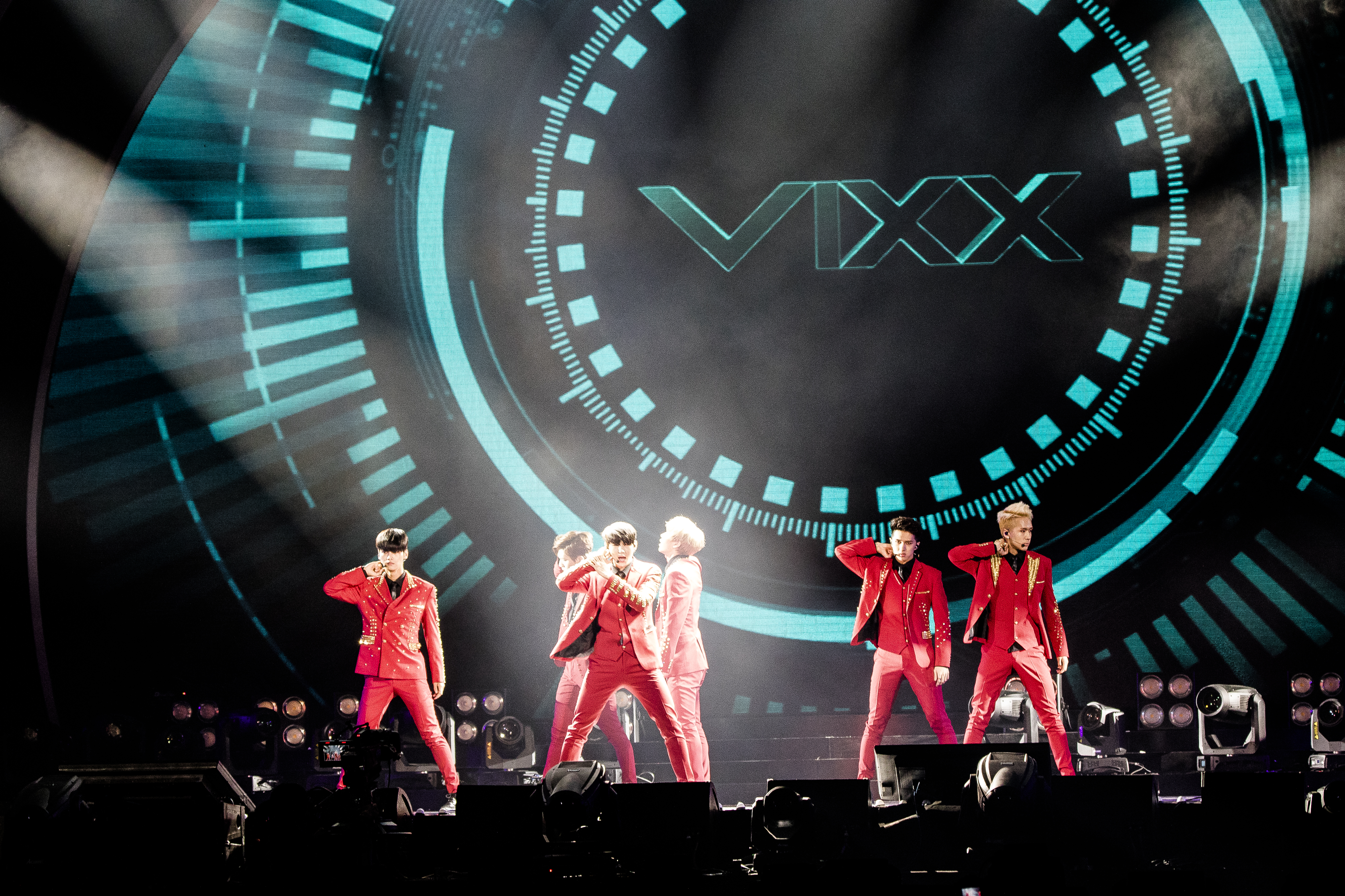 中文（台灣）: 第十屆KKBOX數位音樂風雲榜海外嘉賓VIXX。